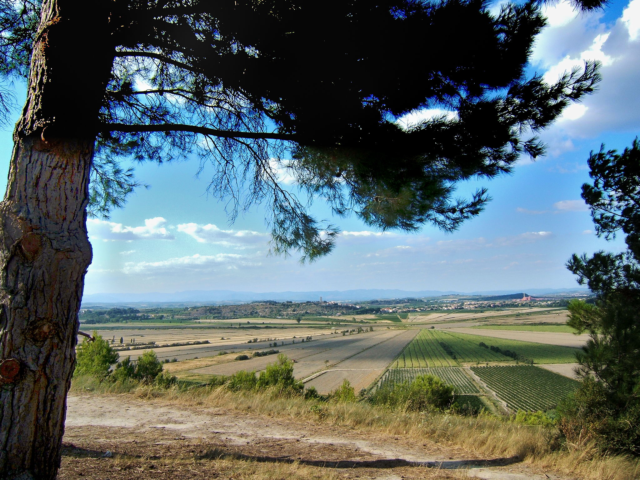 étang de Montady (Hérault)